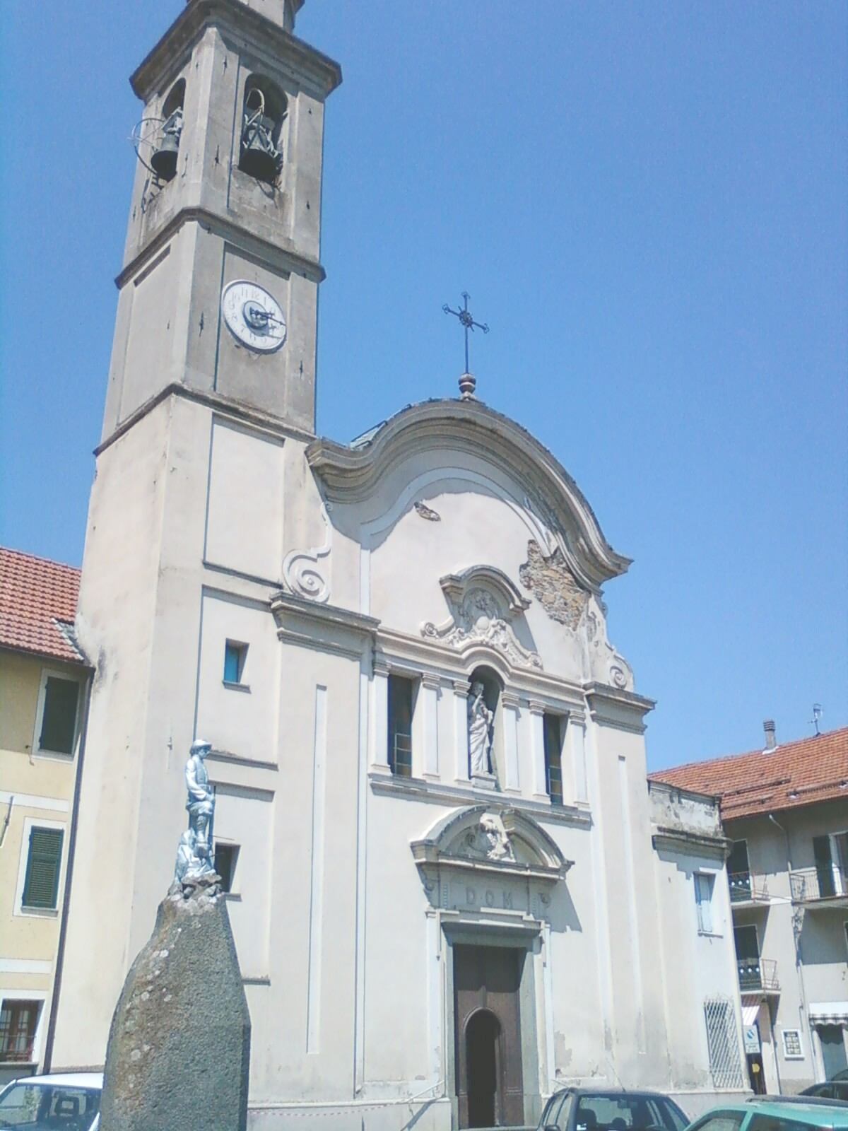 Chiesa Parrocchiale di san Pietro d'Olba, Urbe (Italy)